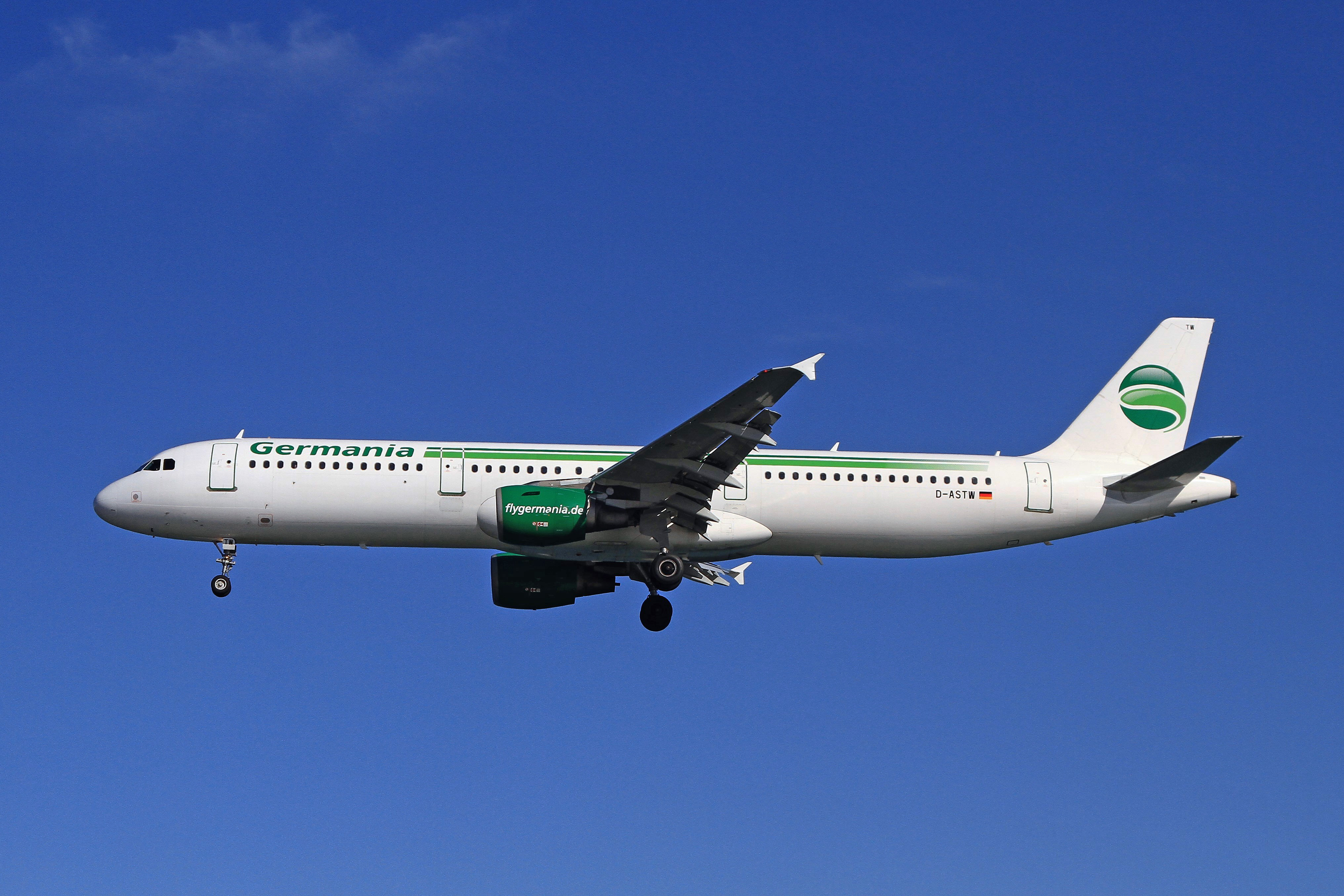 D-ASTW A321 Germania Lanzarote 28-03-2017